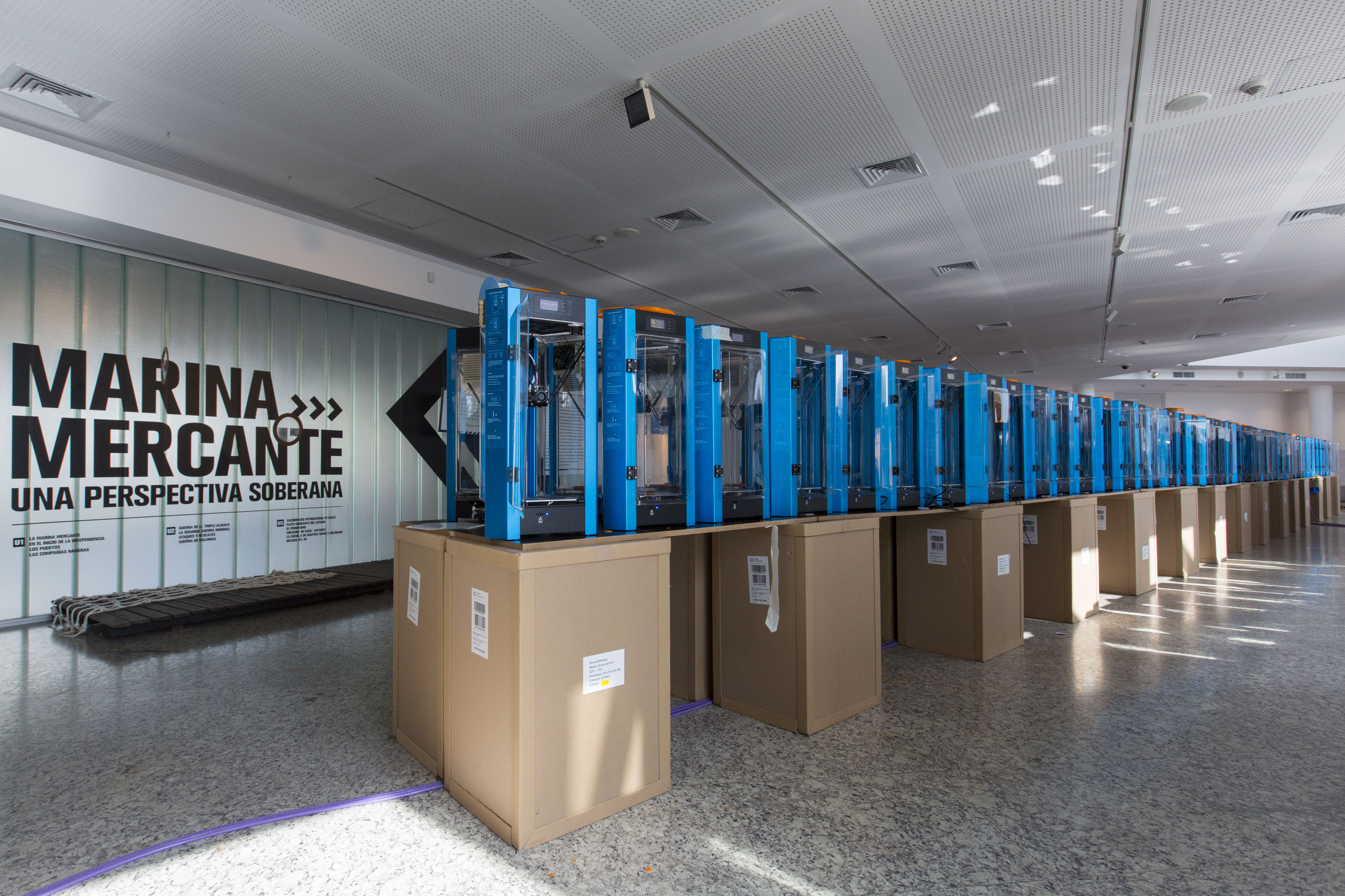 Buenos Aires, 11 de mayo de 2020.- En el Museo Malvinas y EducAR, mil impresoras 3D fabrican hasta siete mil máscaras protectoras por día para el personal de Salud y de las fuerzas de seguridad de todo el país. Fotos: Augusto Starita / Ministerio de Cultura de la Nación.